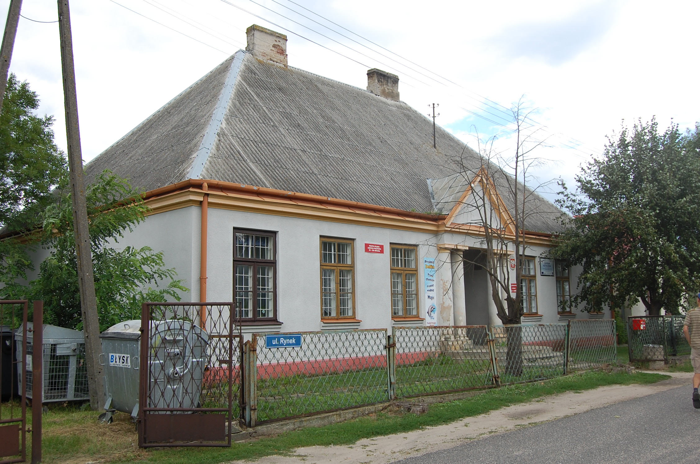 Biblioteka publiczna w Mrozach, filia w Jeruzalu. W serialu Ranczo - szkoła w Wilkowyjach.